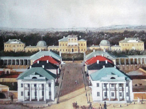 Kurakin Palace in Stepanovskoye